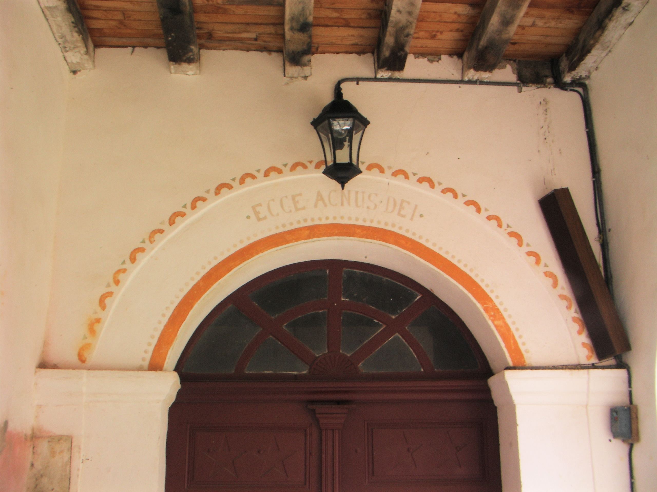 Estaing, France